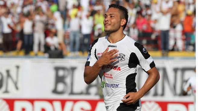 falcon